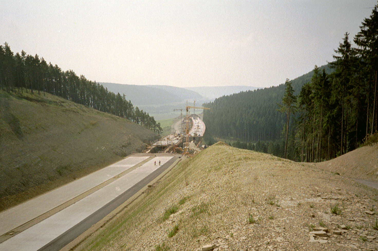 Judentalbrücke der A71 bei Meiningen im Bau